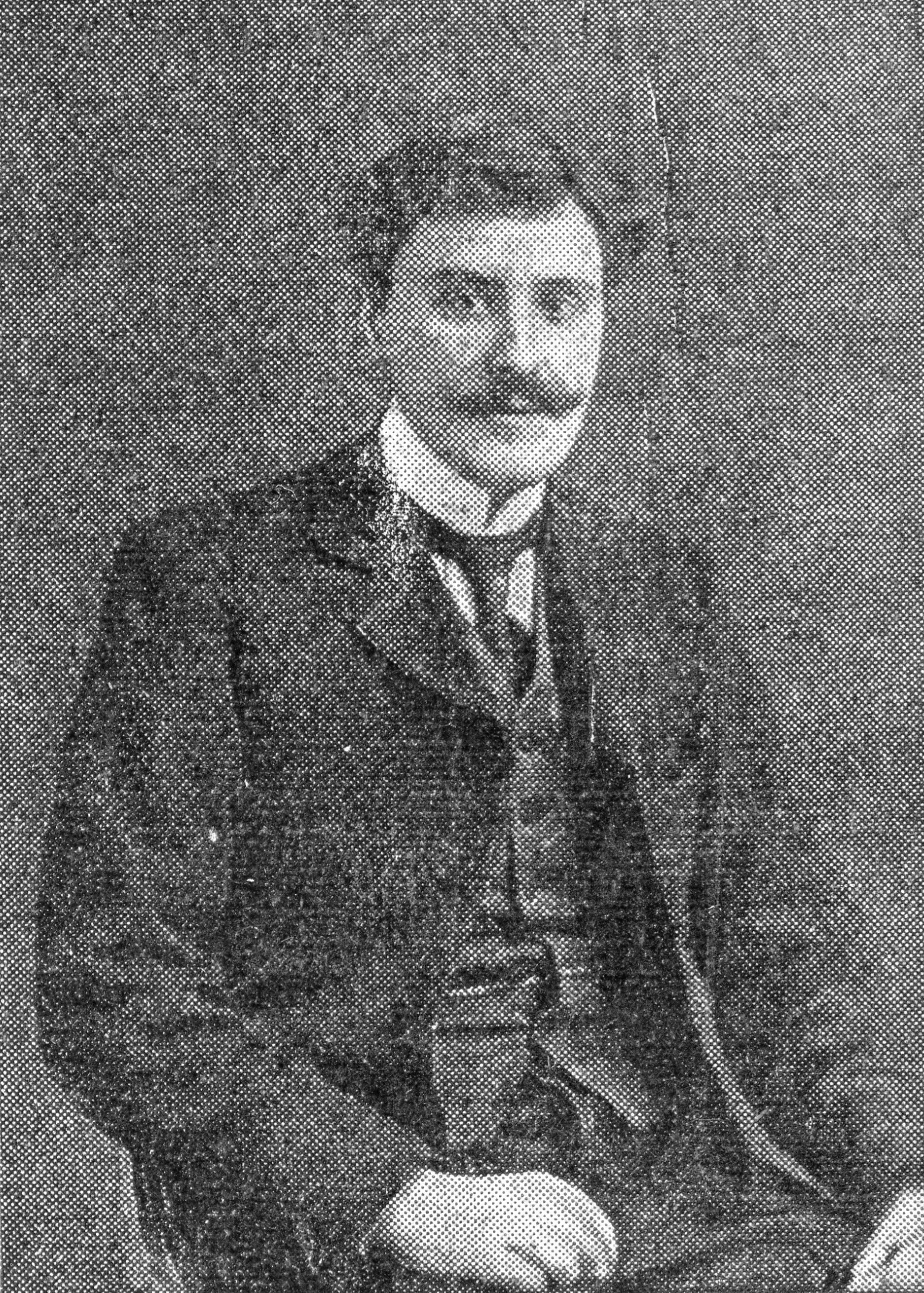 Touche à tout 1910 2ème semestre p 39 Maurice Levaillant par O.Doyé